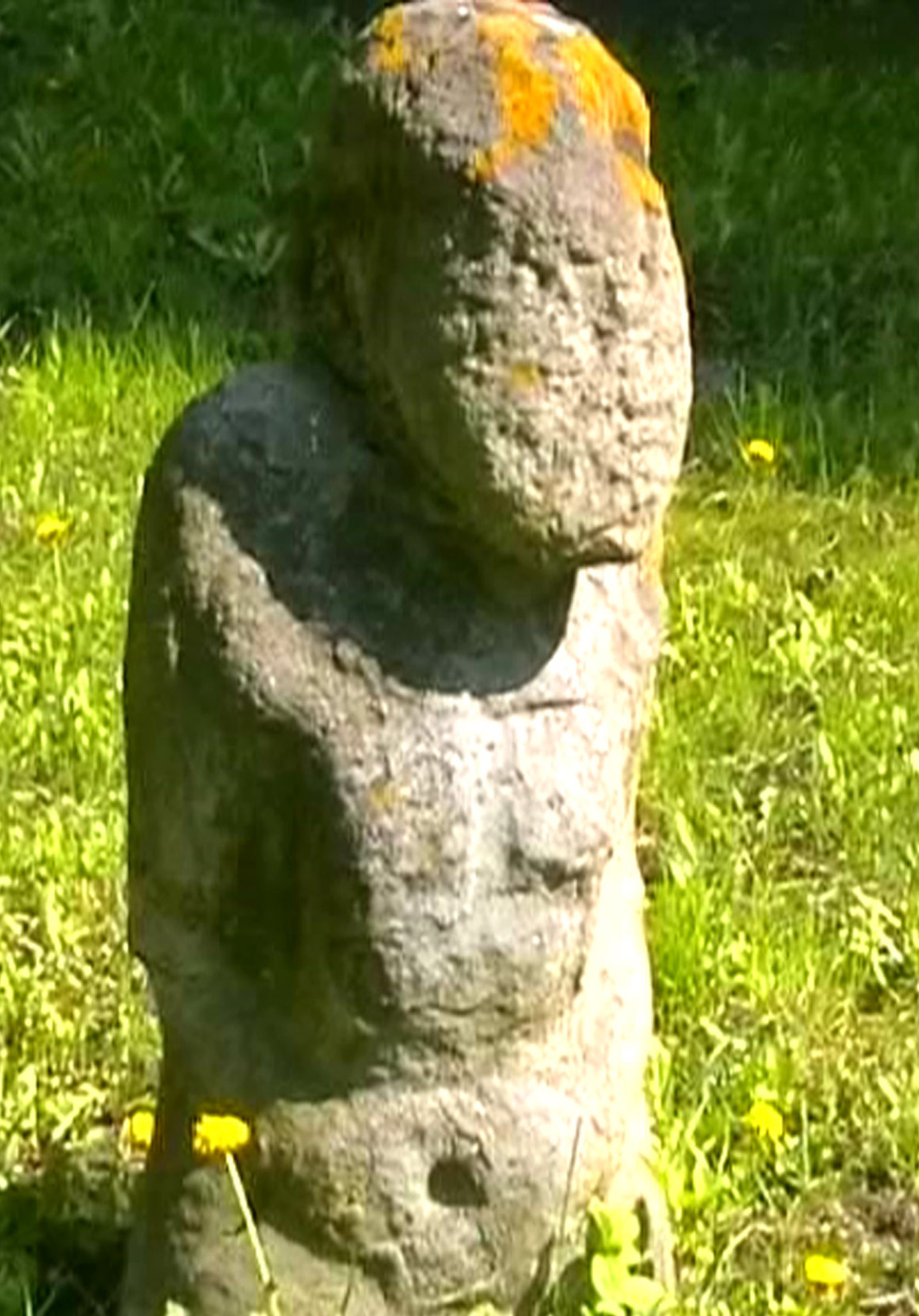 Kipchak stone baba